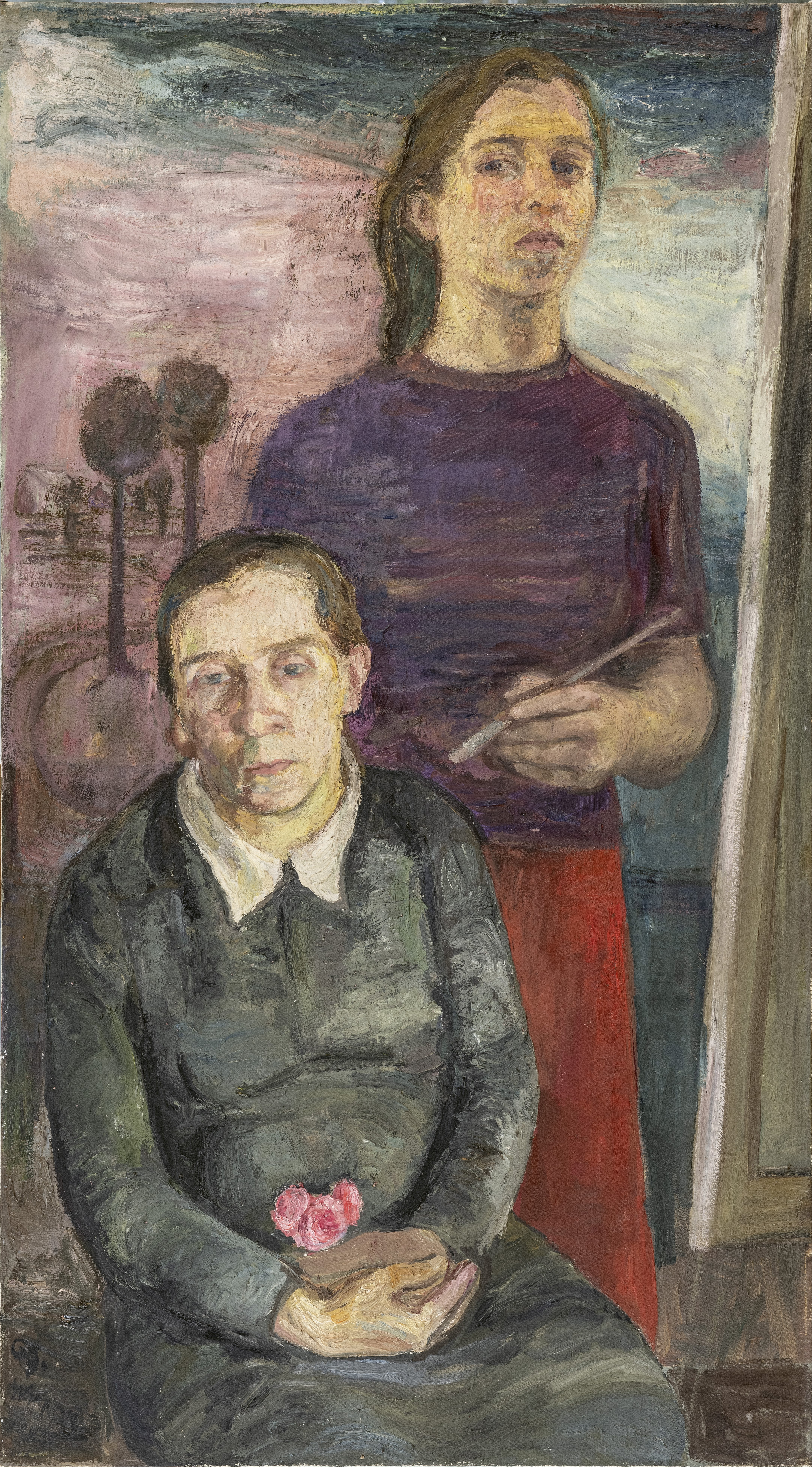 Gudrun Irene Widmann Gemälde-Katalog-001 - Titel: Meine Mutter und ich, 1946, Mischtechnik auf Leinwand, 136 x 76 cm